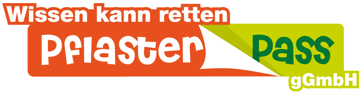 Logo der Pflasterpass gGmbH mit Claim Wissen kann retten